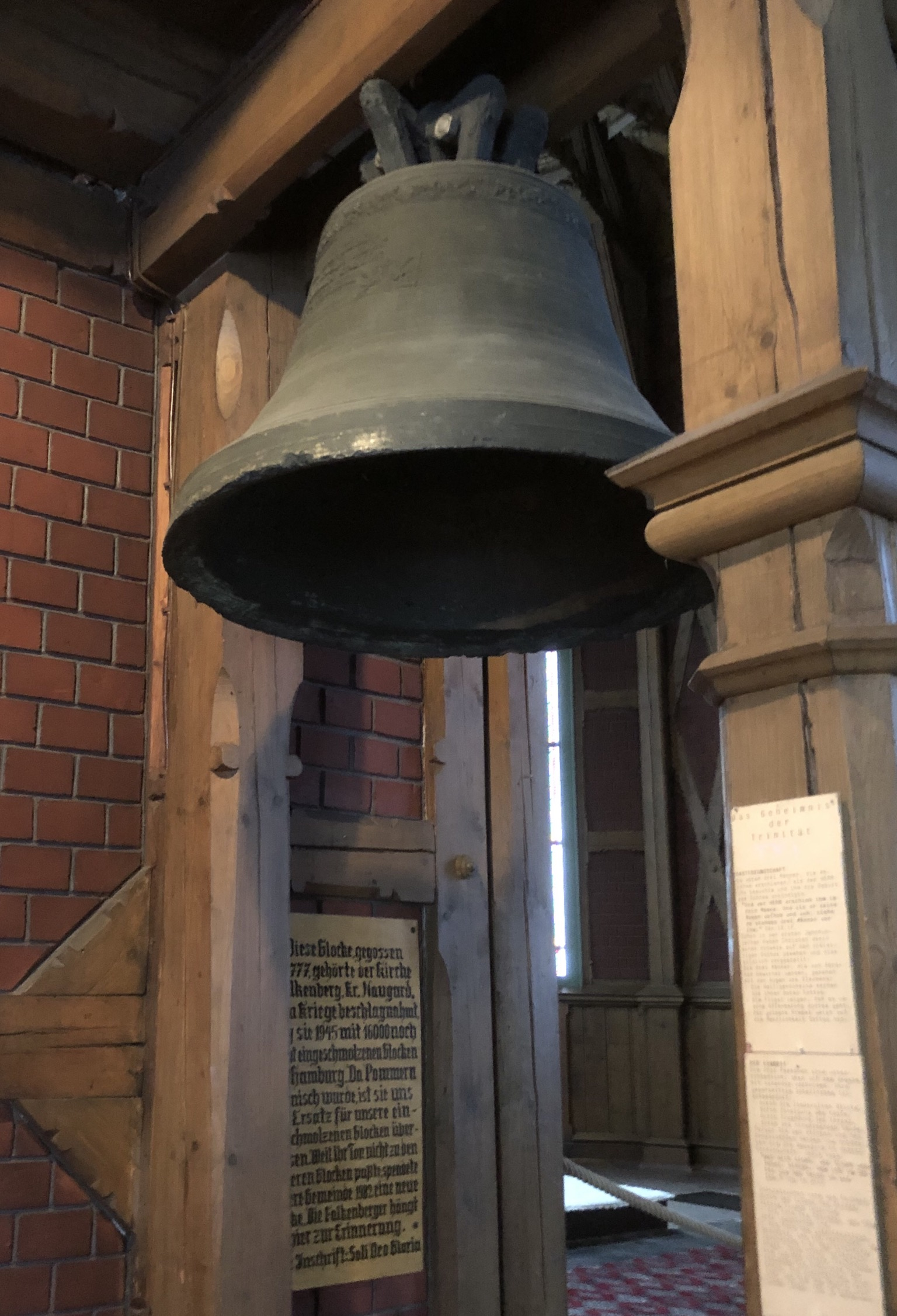 Glocke im Altarraum Trinitatiskirche Braunlage